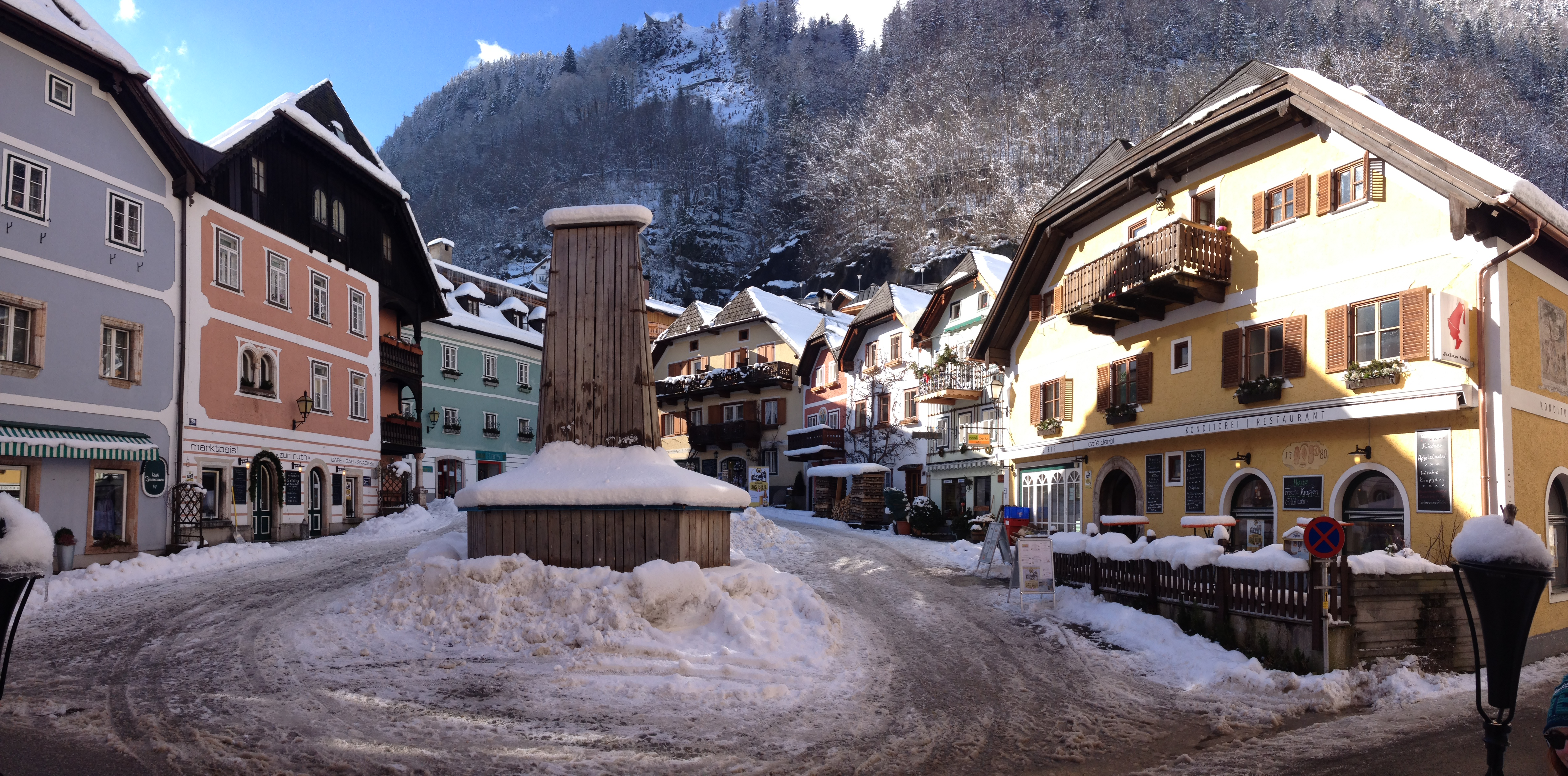 hallstatt